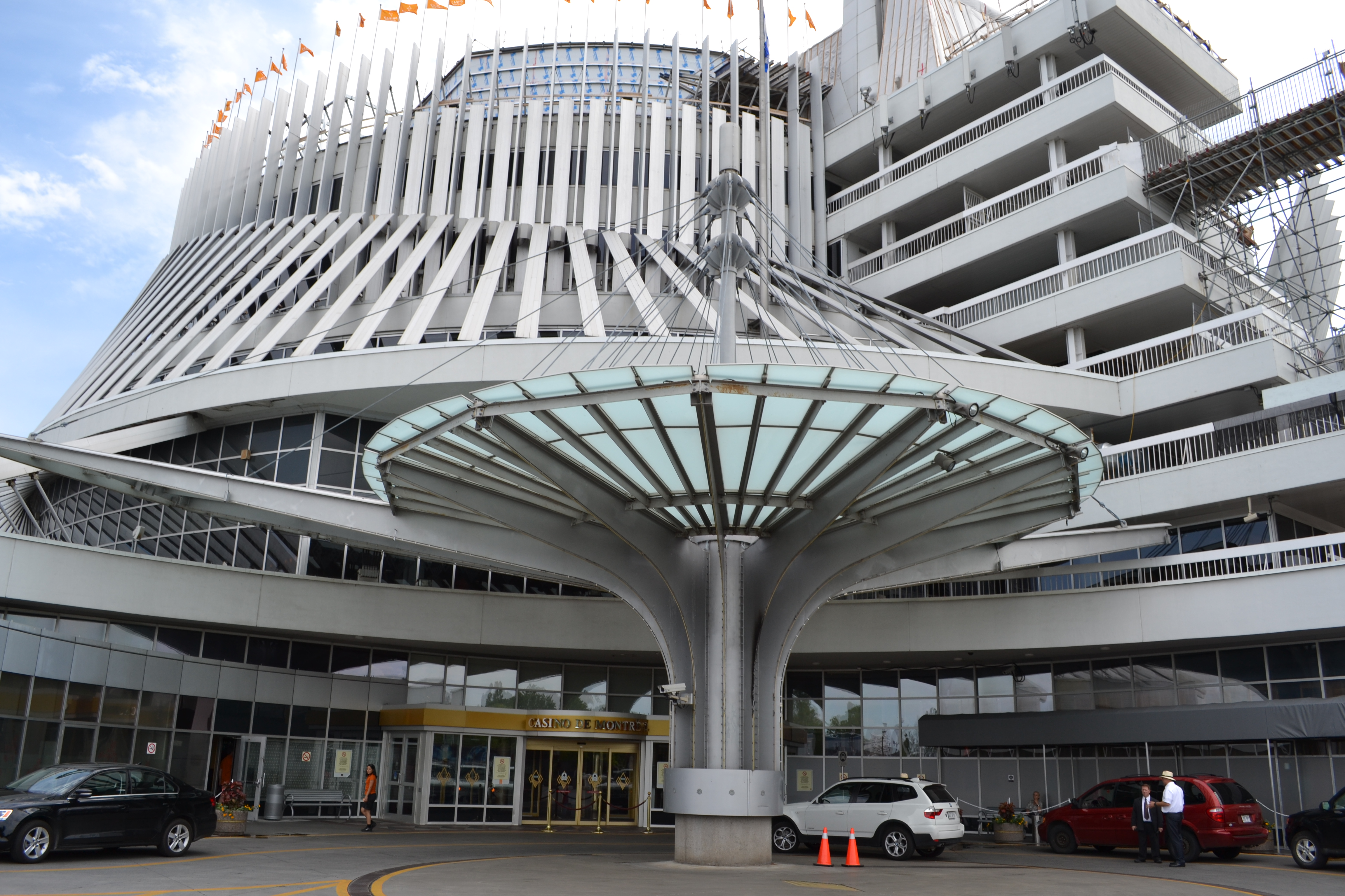 Entrée principale du Casino de Montréal, ancien pavillon de la France à l'expo 67.